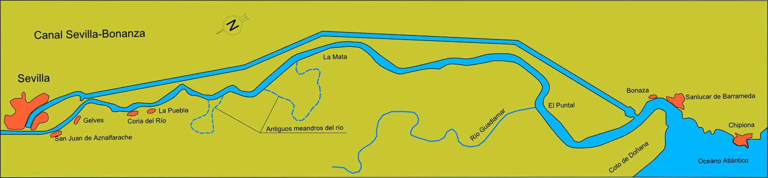 Plano aproximado del trazado del canal Sevilla Bonanza (proyecto no realizado); dibujo realizado por mi con Inkscape; el trazado del río y el tamaño de los núcleos de población, se corresponden con los existentes en en la época de redacción del proyecto (década de 1960), muy distintos de los actuales